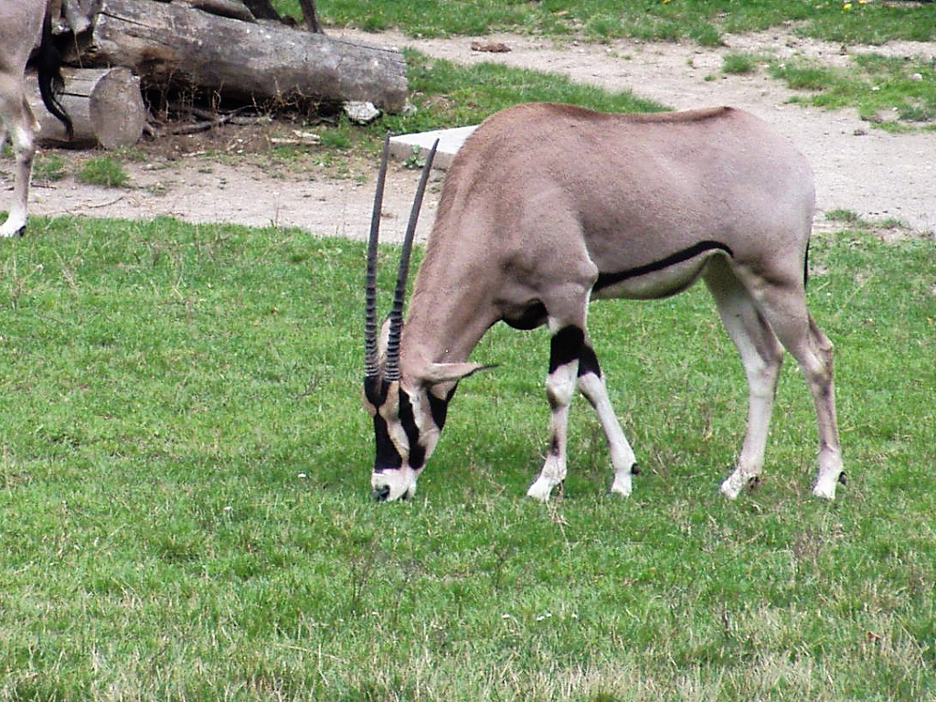 Oryx beisa, Prague Zoo